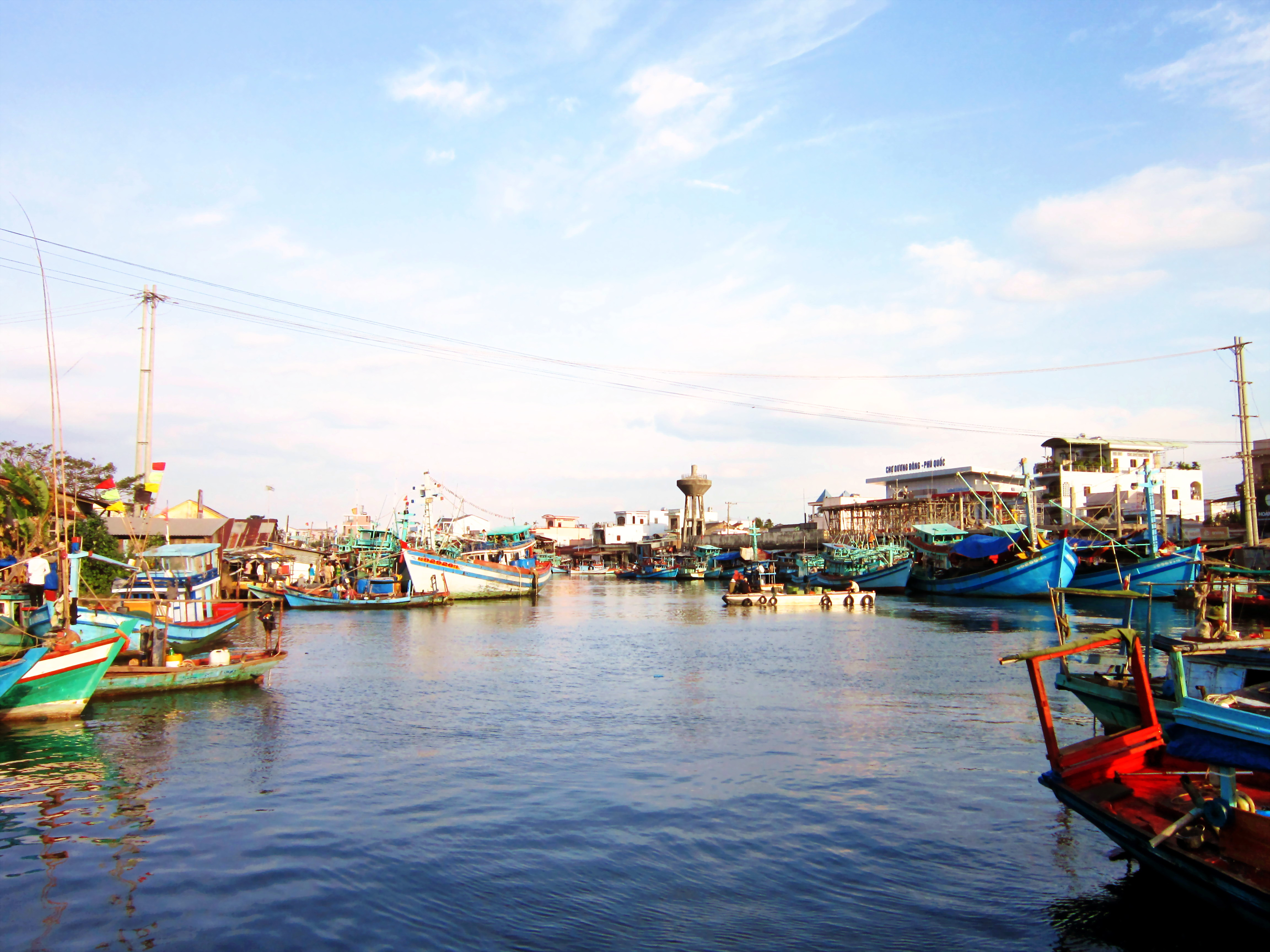 Ở khu vực chợ thị trấn Dương Đông, thuộc Phú Quốc, Kiên Giang, Việt Nam.